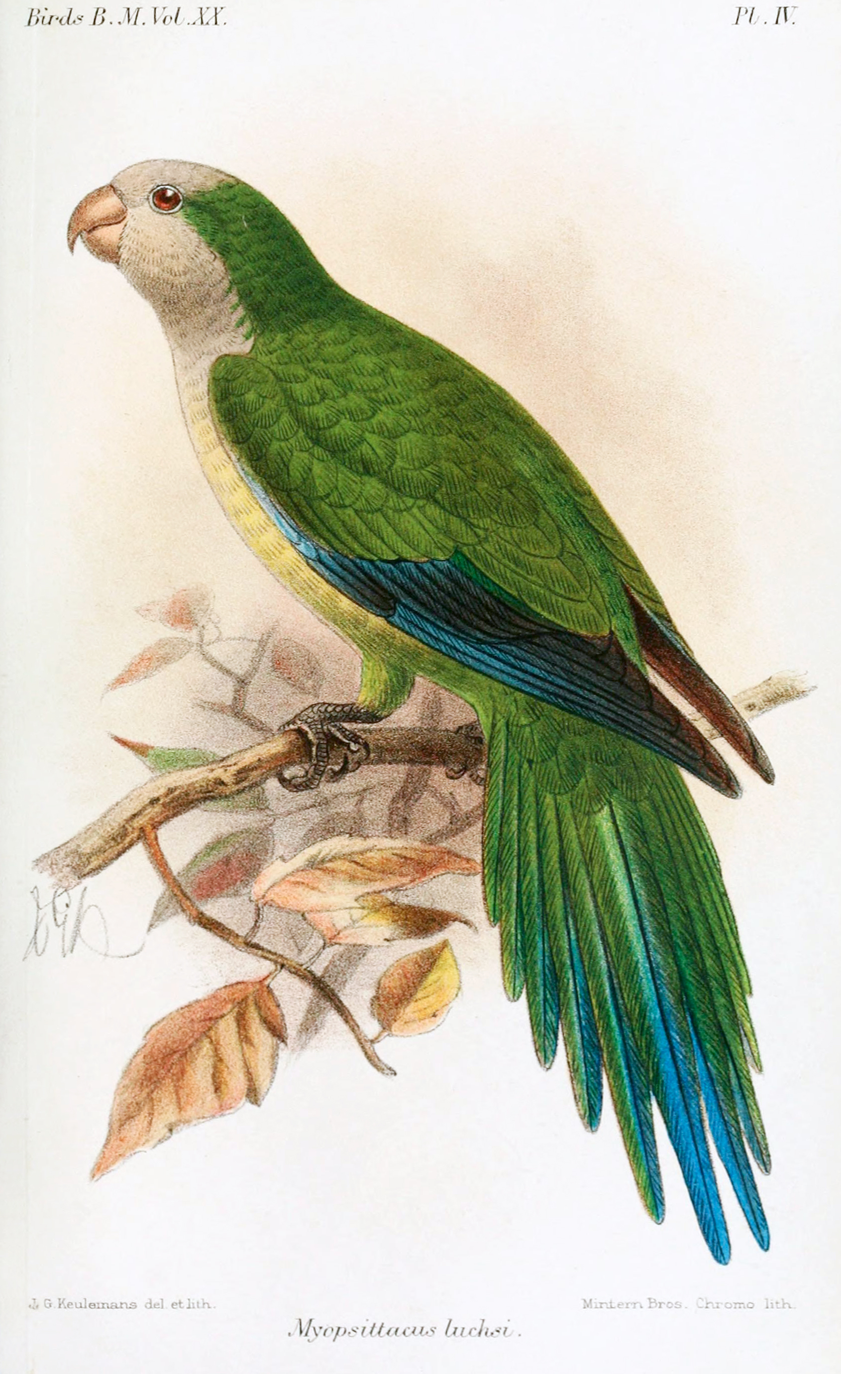 Myopsittacus luchsi = Myiopsitta luchsi (Cliff Parakeet)